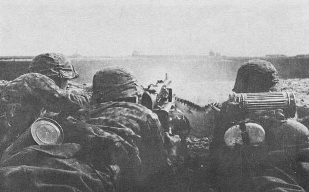 Бійці дивізії СС «Галичина»